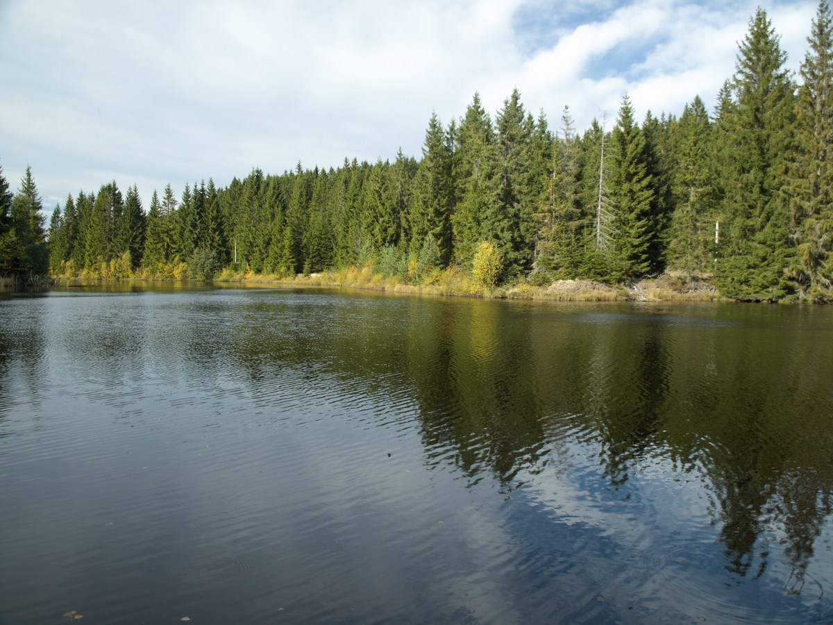 Pohorský rybník - Jiřická nádrž